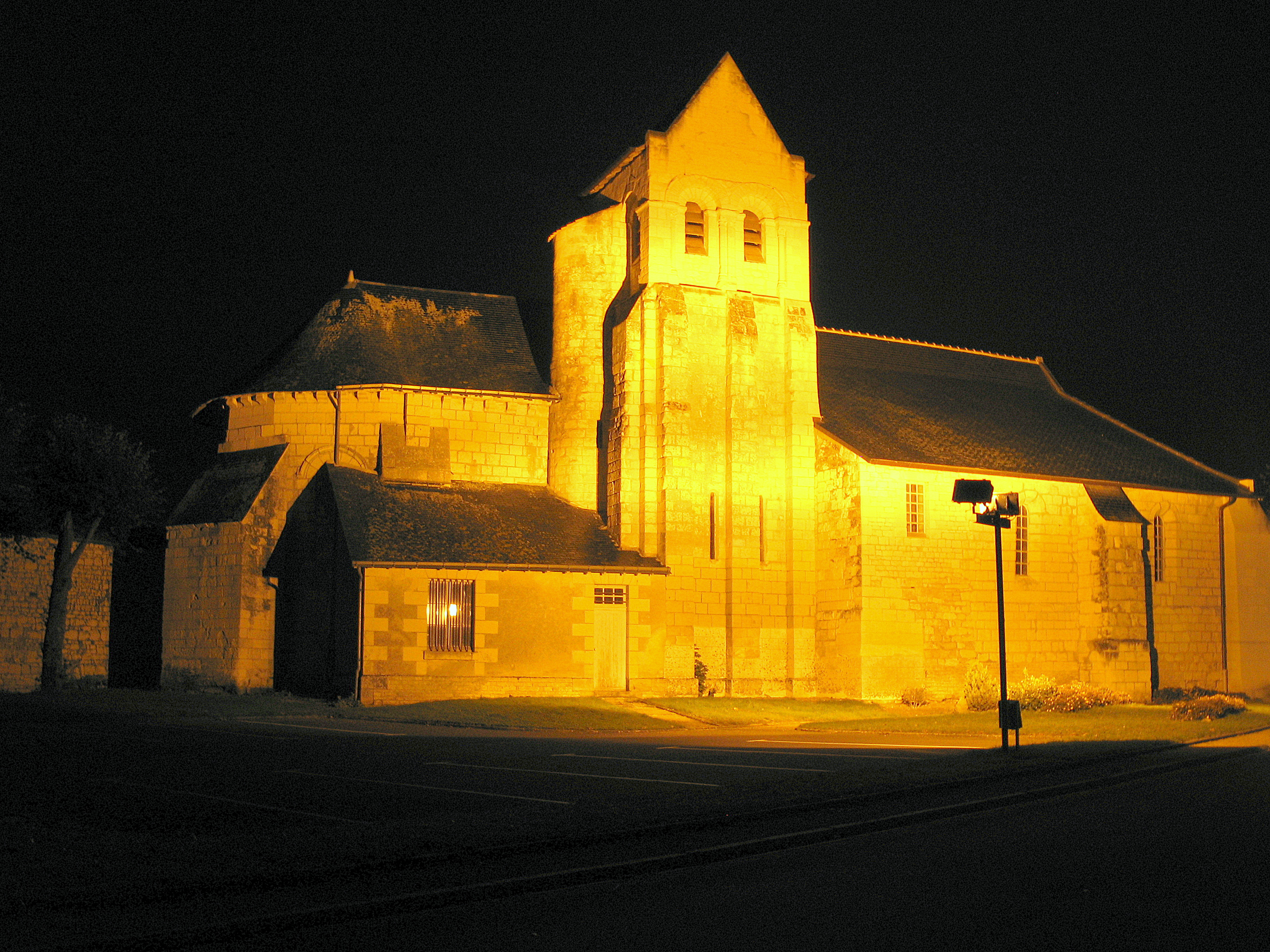 Église de Vézières, dans la Vienne